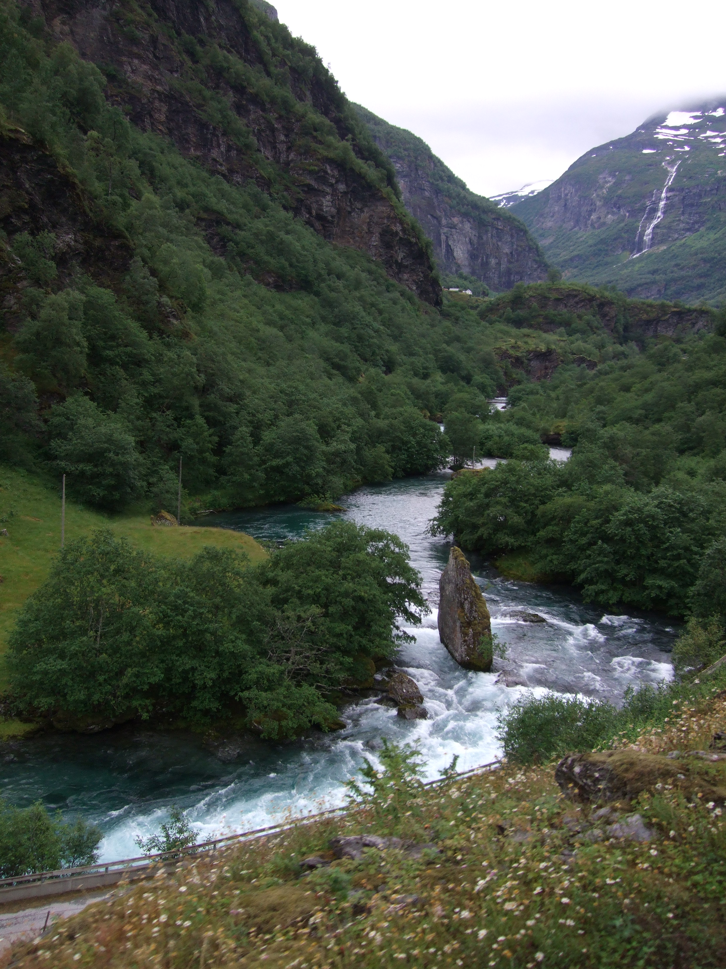 Flåmselvi